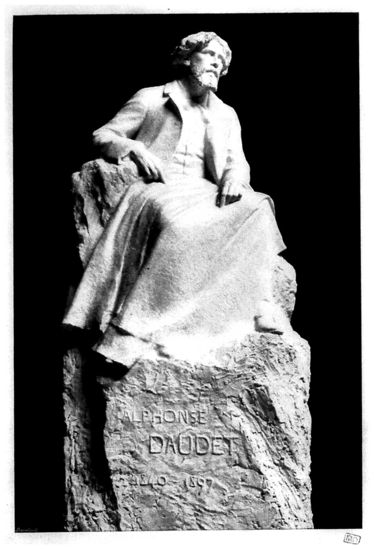 cf titre.